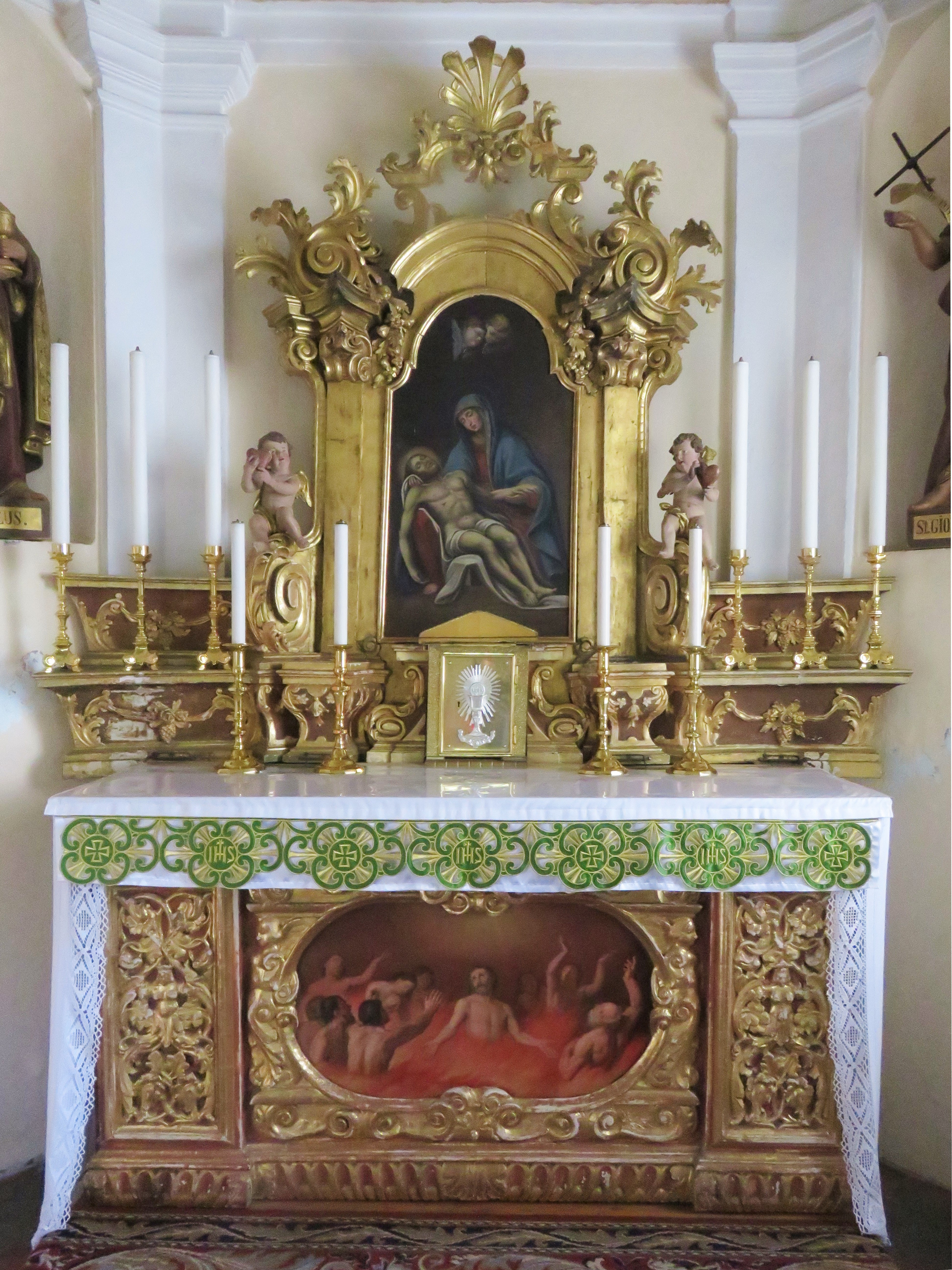 Chiesa della Palanca, o Chiesa della Addolorata, interno. Cappella laterale, antico presbiterio prima della ricostruzione del 1934-1936. Pietà.